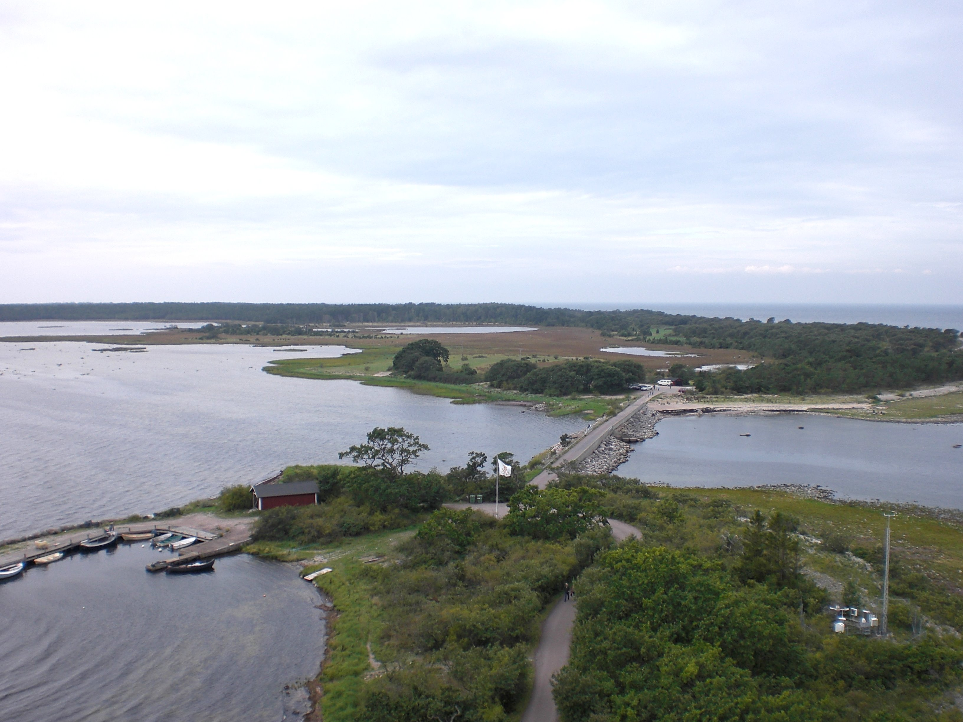 Blick vom Leuchtturm Lange Erik, Öland nach Westen